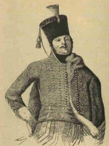 Général_Claude_Pierre_Pajol